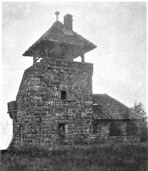 Teufelsmühle-Turm am 01.10.1926, also vor der Erhöhung (1952) von 10 Meter auf 16,2 Meter